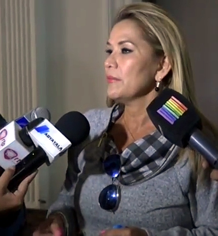 Senadora Jeanine Añez en abril de 2018